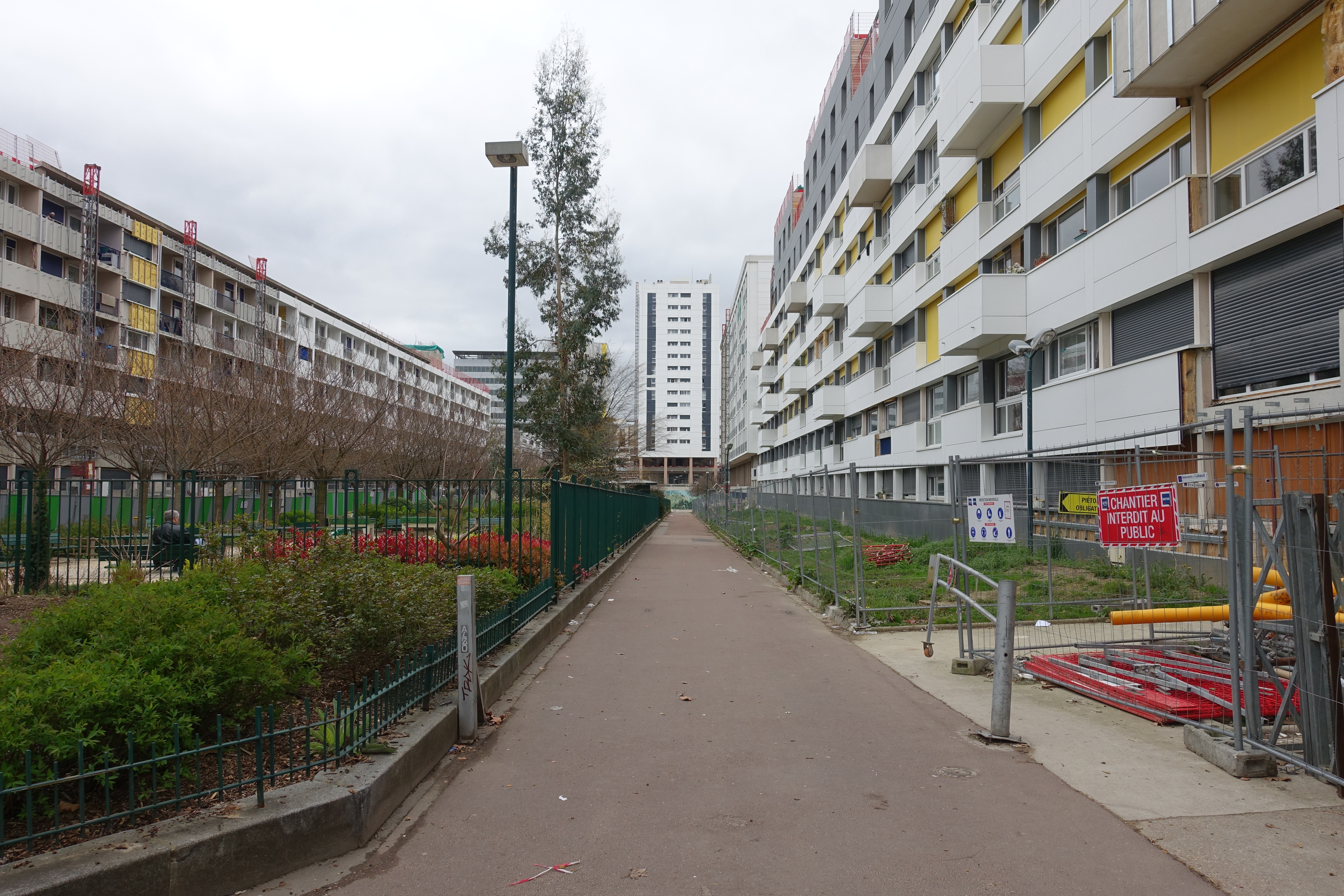 Mail de Bièvre @ Paris